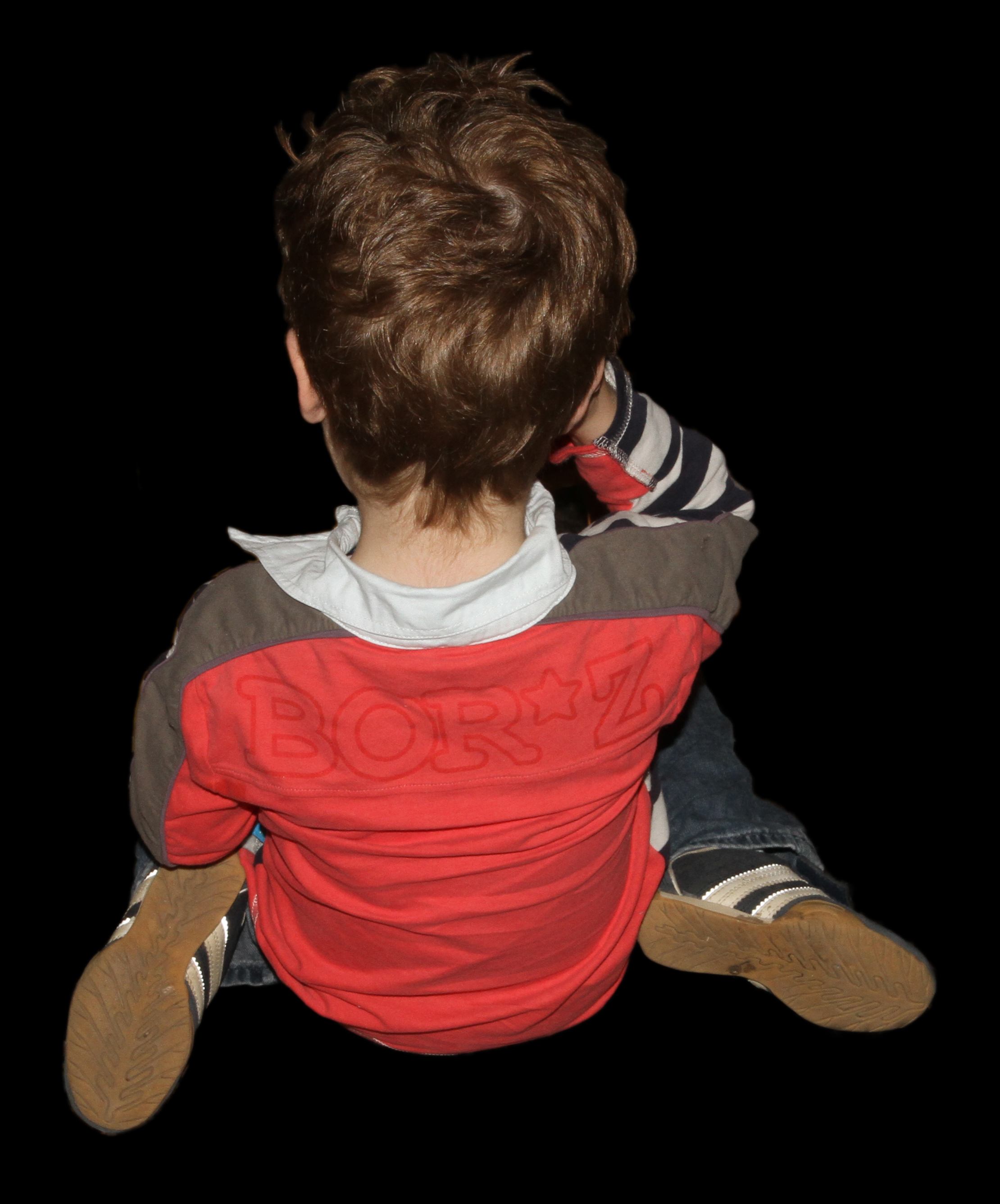 3-jähriger Junge im Najadensitz